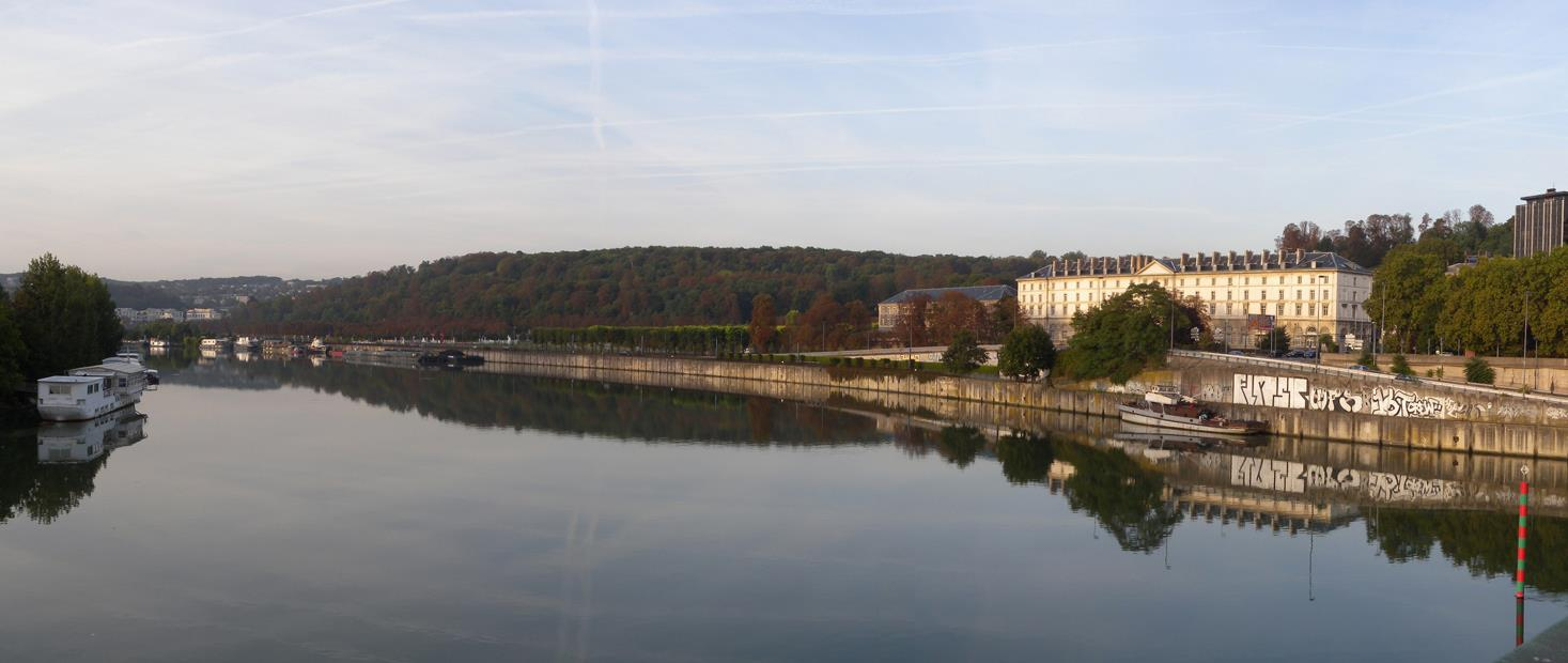 Le futur musée du Grand Siècle au sein du parc de Saint-Cloud